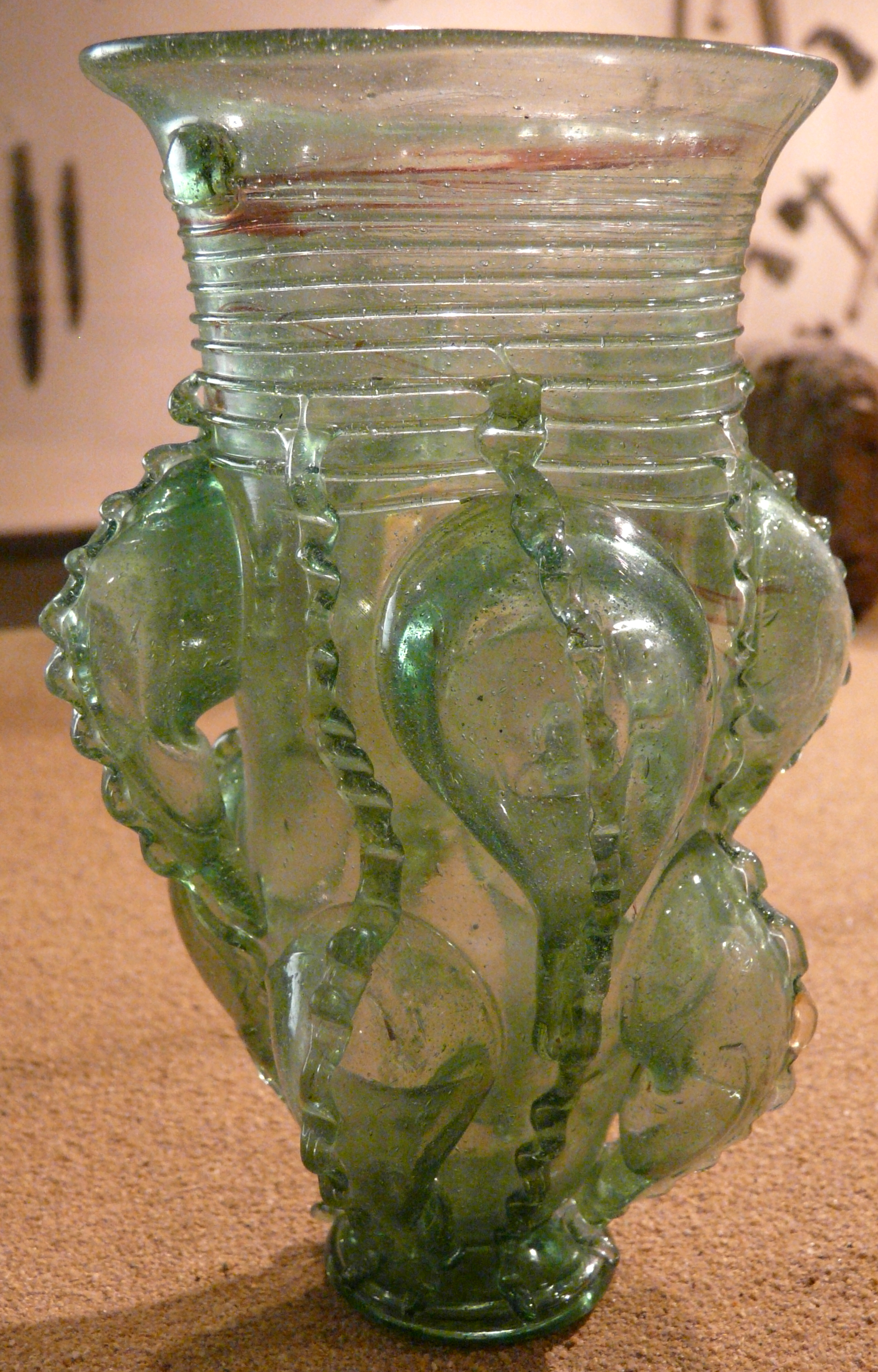 Fränkischer Rüsselbecher (6. Jh.) aus dem Museumszentrum Burg Linn